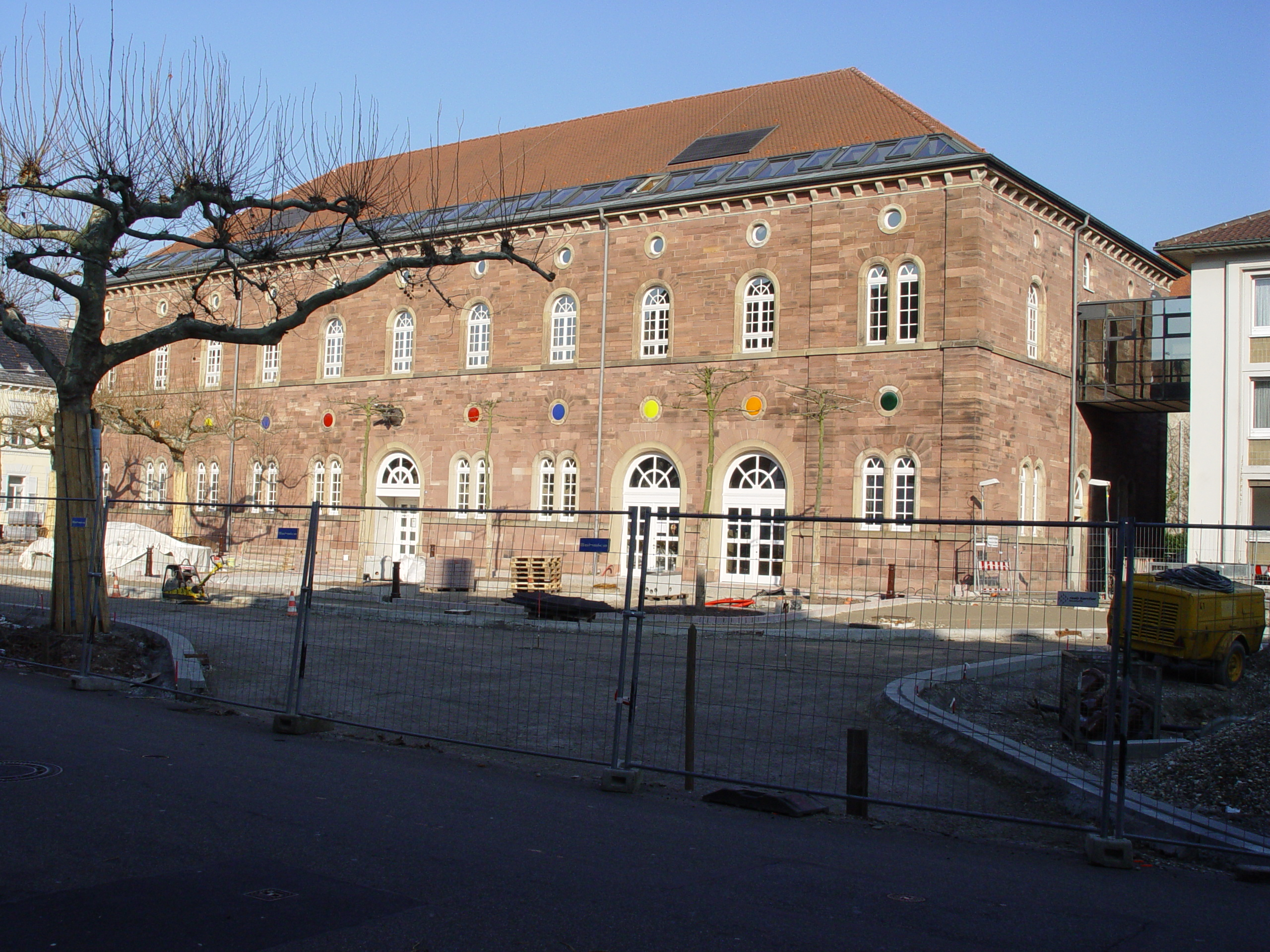 Die Fruchthalle in Rastatt, der Vorplatz ist noch Baustelle.